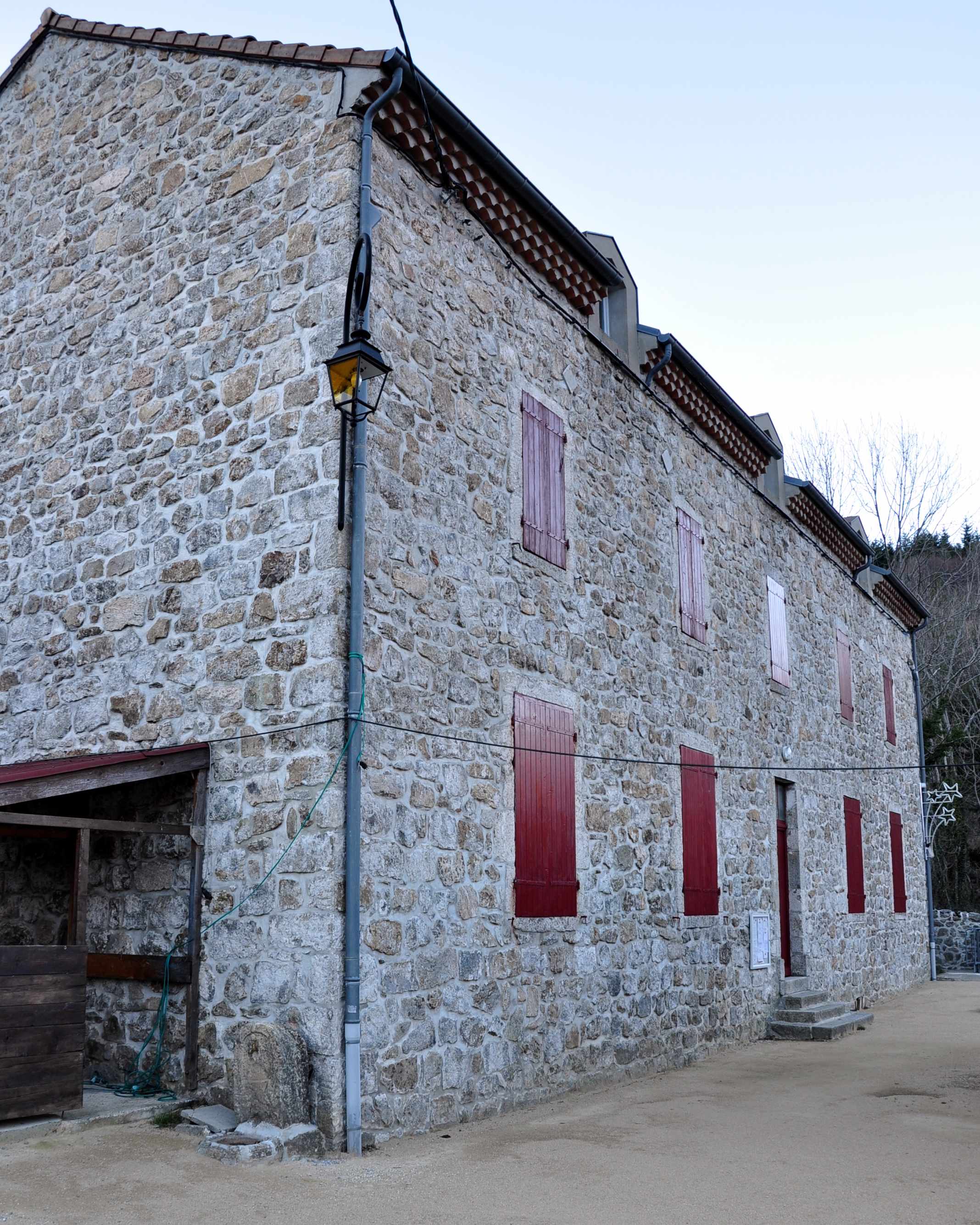 Mairie de Péreyres. Une pancarte indique : Péreyres Créée en 1854, commune des Hautes Cévennes Ardéchoises avec un point culminant à 1412 mètres, Péreyres équilibre parfaitement son espace vital entre le dépaysement total et la civilisation. En effet, proche d'axes de communication à grande fréquentation, la commune ne se situe qu'à une trentaine de kilomètres d'Aubenas tout en étant irrigué par la Sève du cœur naturel de la Montagne Ardéchoise. Avec les deux cascades du Ray-Pic, site classé depuis 1931, qui jaillissent d'une coulée basaltique de soixante mètres de haut, le village et ses hameaux aux vieilles maisons de pierres restent une curiosité touristique plein de charme et d'authenticité. Bon ton myrtille et bon ton soleil, Péreyres fête ce fruit sauvage et 100% naturel, qui lui ressemble si bien.